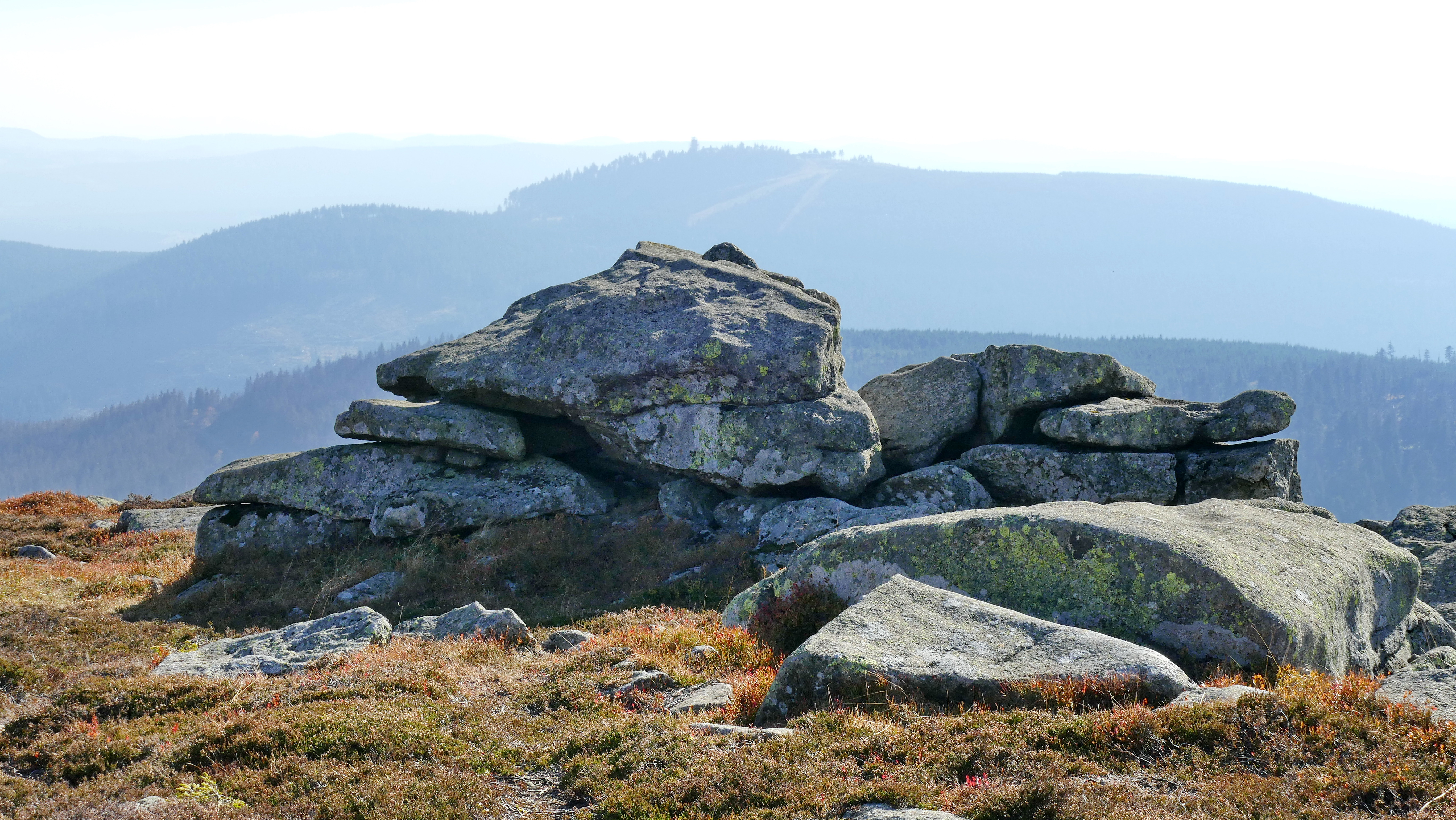 Die Teufelskanzel und der Hexenaltar sind ein Geologisches Naturdenkmal im Landkreis Harz in Sachsen-Anhalt mit der Nummer ND 0054WR. Sie befinden sich in der Gipfelregion des Brockens im Nationalpark Harz.